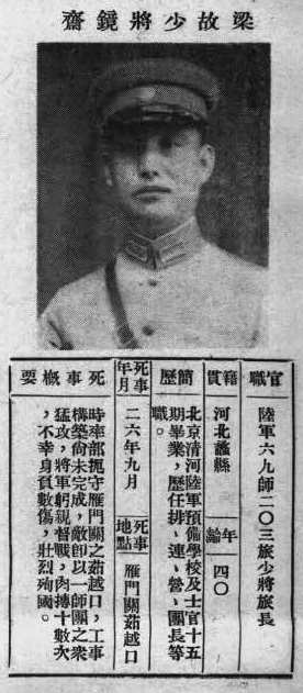 中文（台灣）: 抗戰軍人忠烈錄第一輯中的烈士遺像